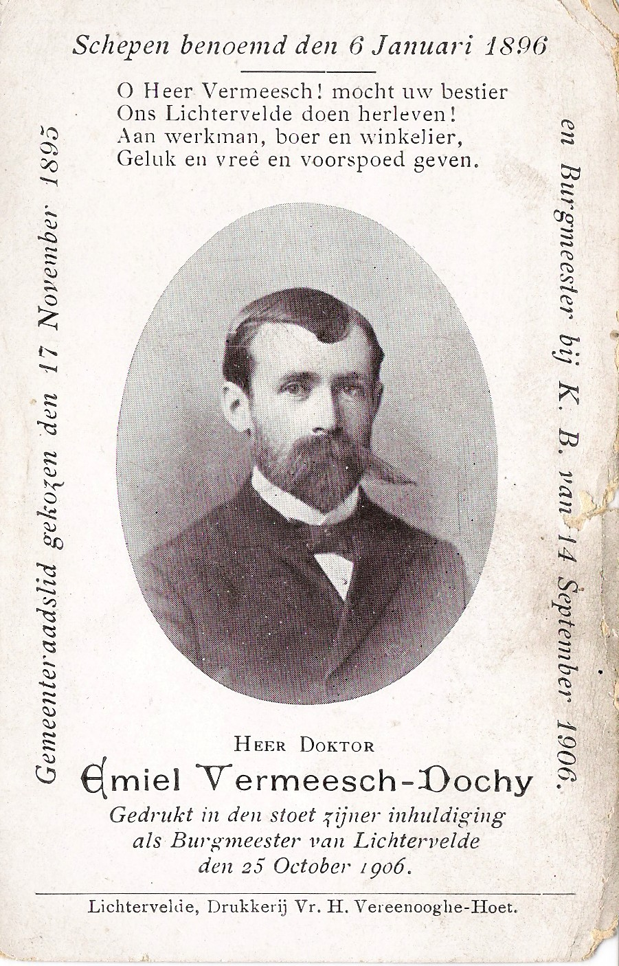 Emiel Vermeersch Dochy